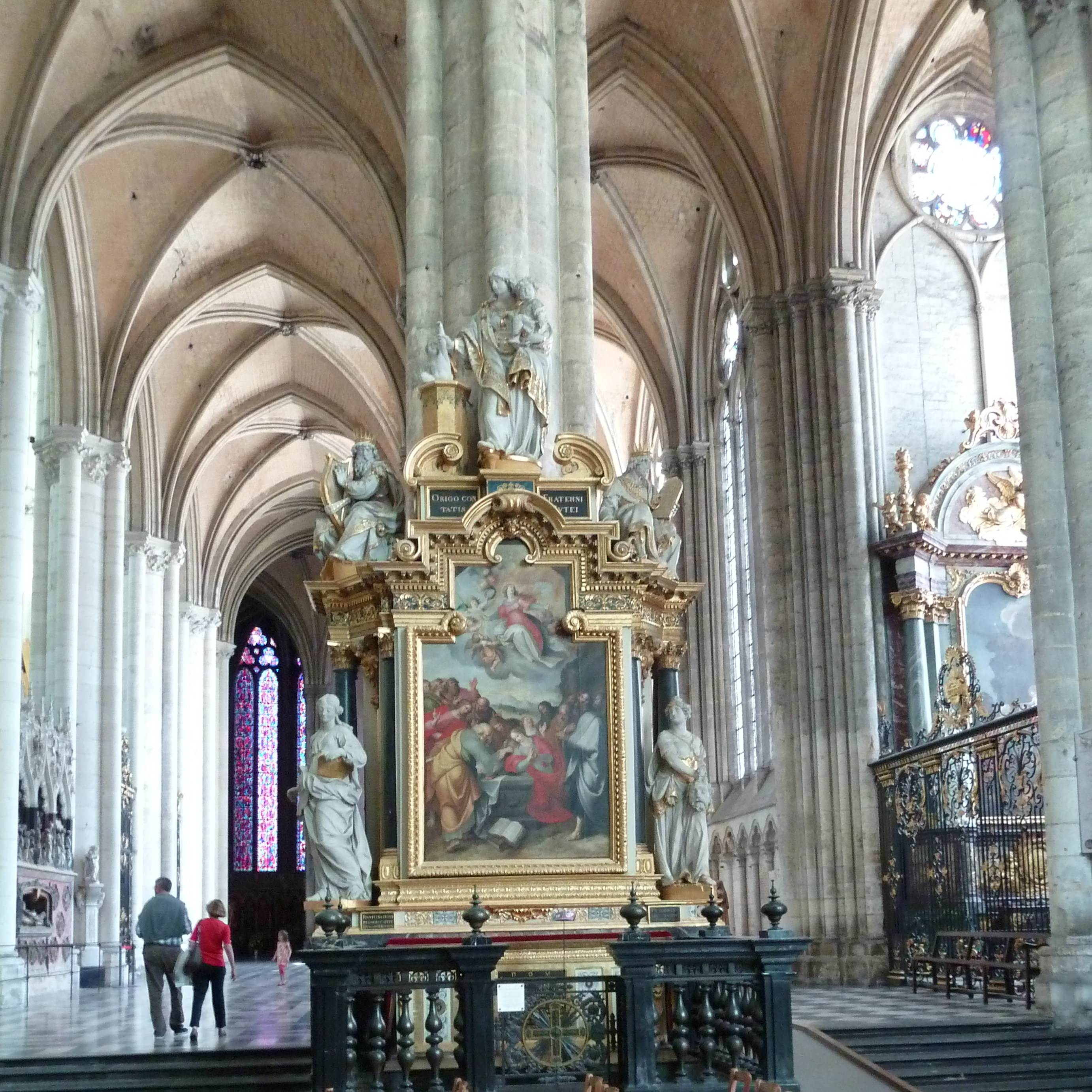 La Cathédrale Notre-Dame d'Amiens commune d' Amiens dans la Somme, France; autel-retable dit "du Pilier rouge" ou de Notre-Dame-du-Puy dans le transept sud.